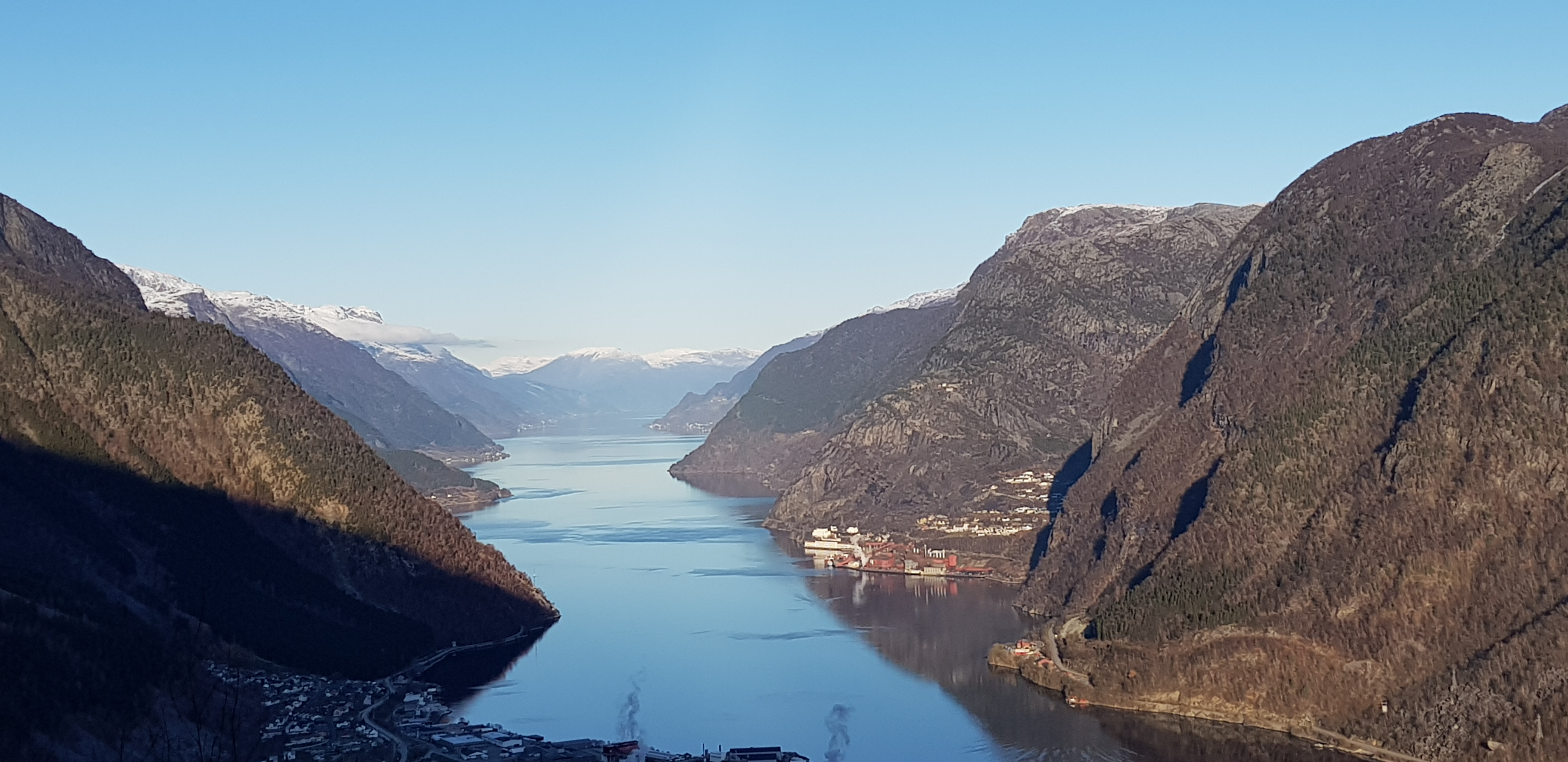 Sørfjorden i Hardanger. Bilde tatt i nordlig retning. Eitrheimsneset i underkant av bildet og Tyssedal nede til høyre i bildet.